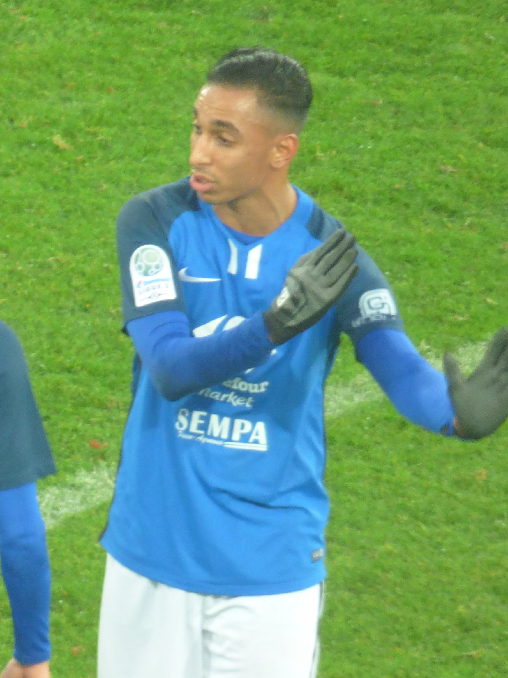 Malek Chergui pendant le match RC Lens / Grenoble Foot 38, le 24 novembre 2018, comptant pour la quinzième journée du championnat de France de football de Ligue 2 2018-2019, au Stade Bollaert-Delelis.